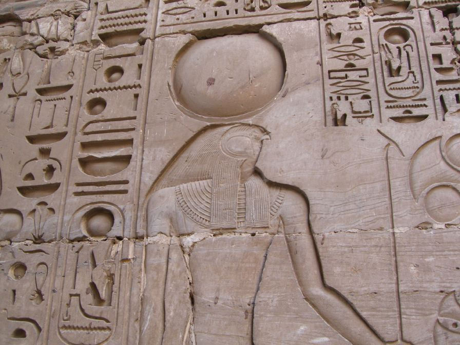 Relief représentant le dieu Khonsou sous sa forme hiéracocéphale - Temple de Khonsou à Karnak - XXe dynastie égyptienne